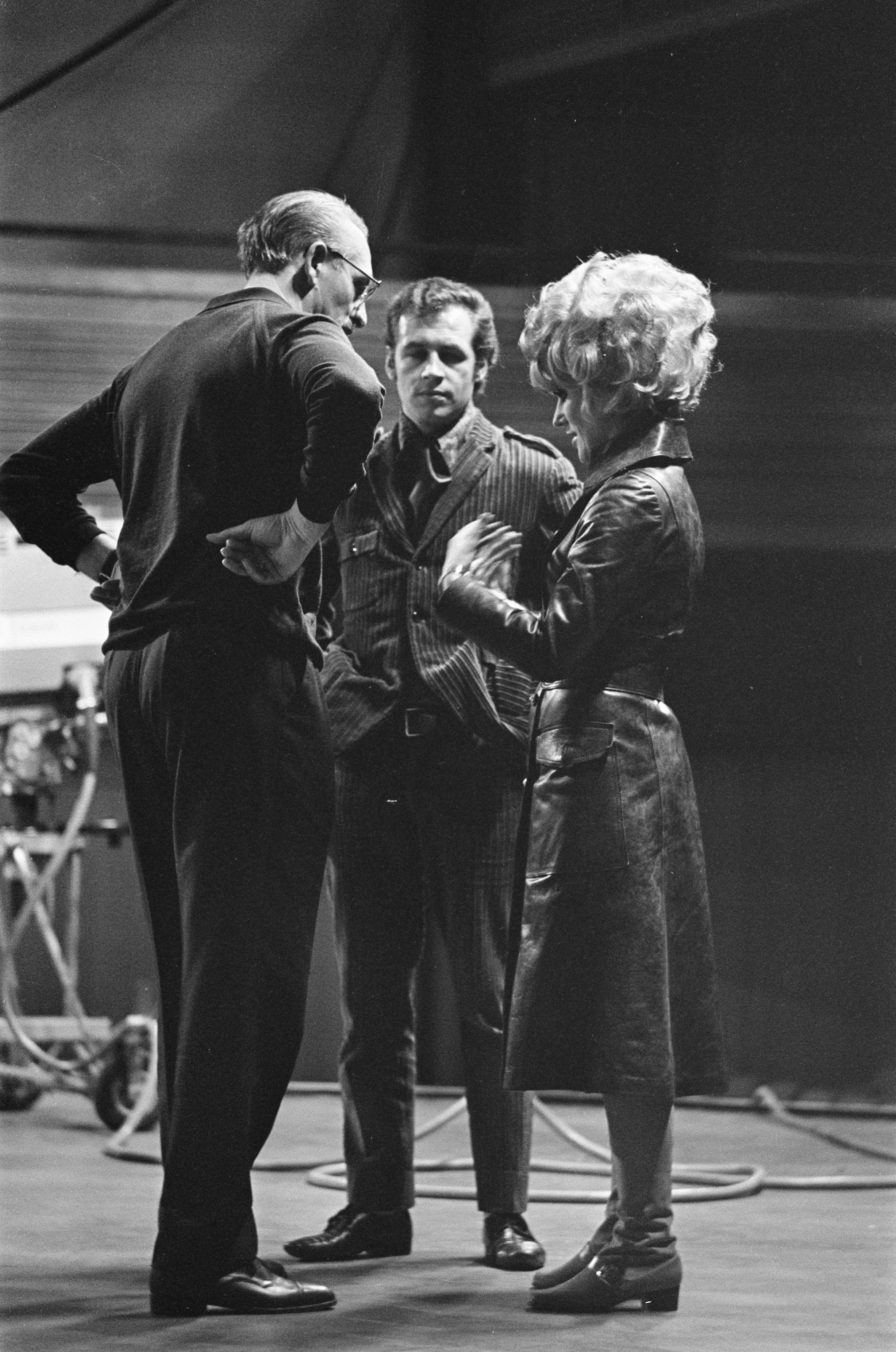 Collectie / Archief : Fotocollectie Anefo Reportage / Serie : Grand Gala du Disque 1968 Beschrijving : Grand Gala du Disque in RAI. Dusty Springfield in gesprek Datum : 6 maart 1968 Locatie : Amsterdam Trefwoorden : zangers Persoonsnaam : Springfield, Dusty Instellingsnaam : RAI Fotograaf : Nijs, Jac. de / Anefo Auteursrechthebbende : Nationaal Archief Materiaalsoort : Negatief (zwart/wit) Nummer archiefinventaris : bekijk toegang 2.24.01.05 Bestanddeelnummer : 921-1412 Reacties Geplaatst door Maaike op 07 maart 2014 - 18:59. Locatie: RAI-congrescentrum Plaats: Amsterdam, Noord-Holland